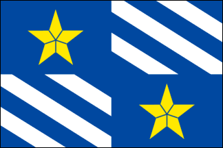 Vlag van de gemeente Olen